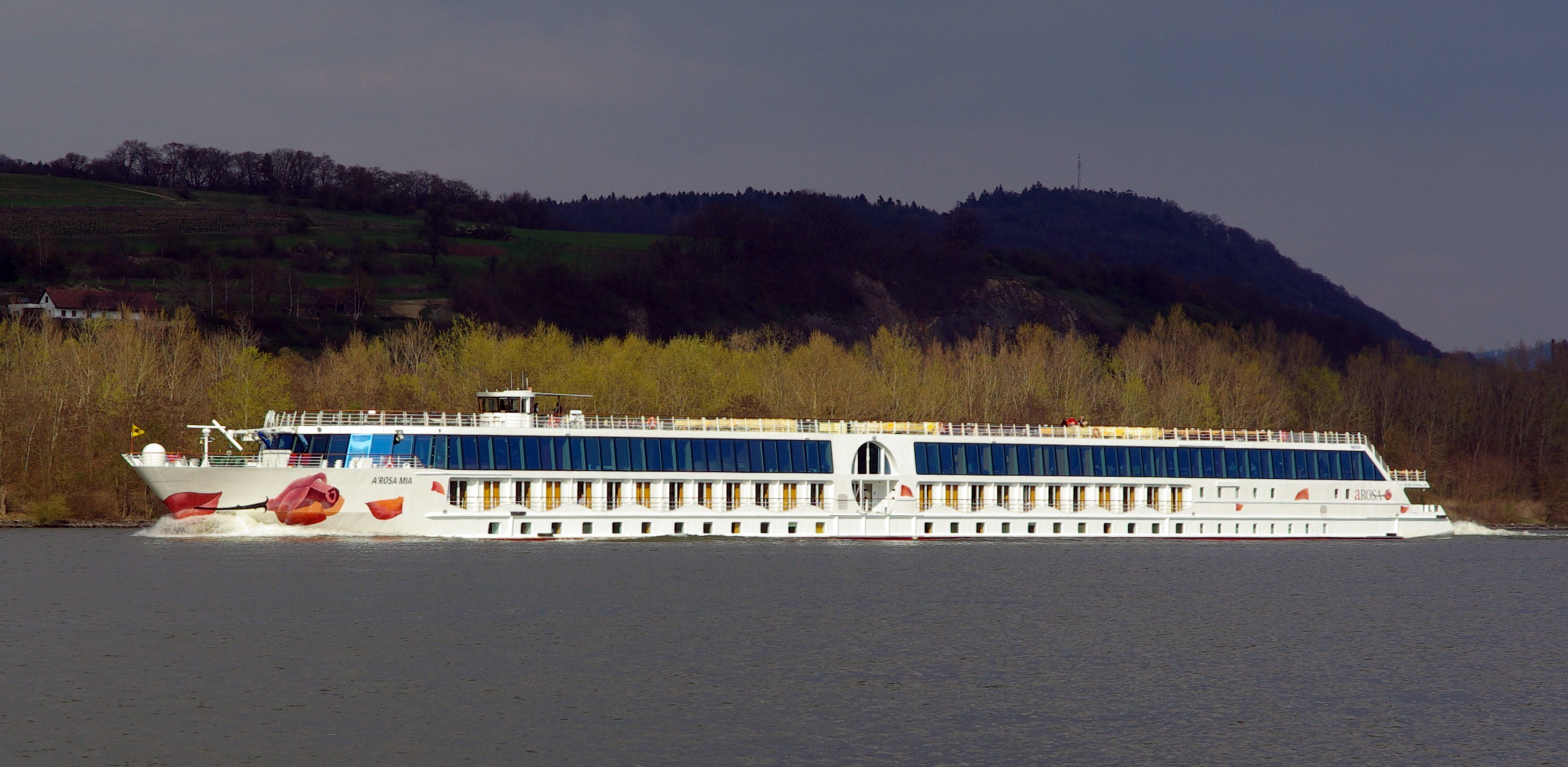 Das Passagierschiff A'Rosa Mia auf der Donau in Niederösterreich.